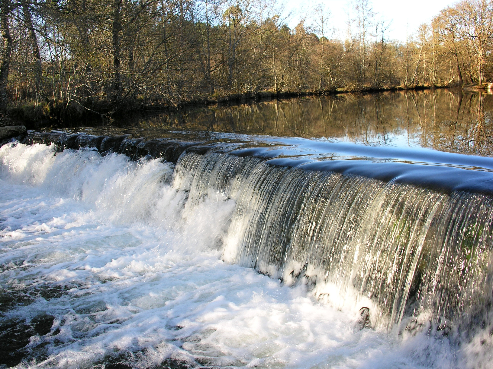 Río Furelos, parroquia de Furelos, concello de Melide, Galiza